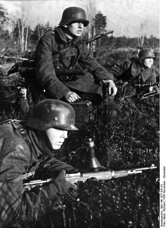 Abwehrkampf im Raum um Newel.(Zwischen Seen- in Sumpf und Wald) Mit großer Spannung erwarten die Männer den Panzervernichtungstrupps die durch eine Waldschlucht heranrollenden Stahlkolosse. Feuerbereit liegt das MG, um die feindliche Infanterie von den Panzern zu trennen, damit der im Vordergrund liegende Panzernahkampfjäger mit der tödlichen Ladung den Panzer vernichten kann. PK Muck, 21.Dezember 1943 [Freigabedatum]